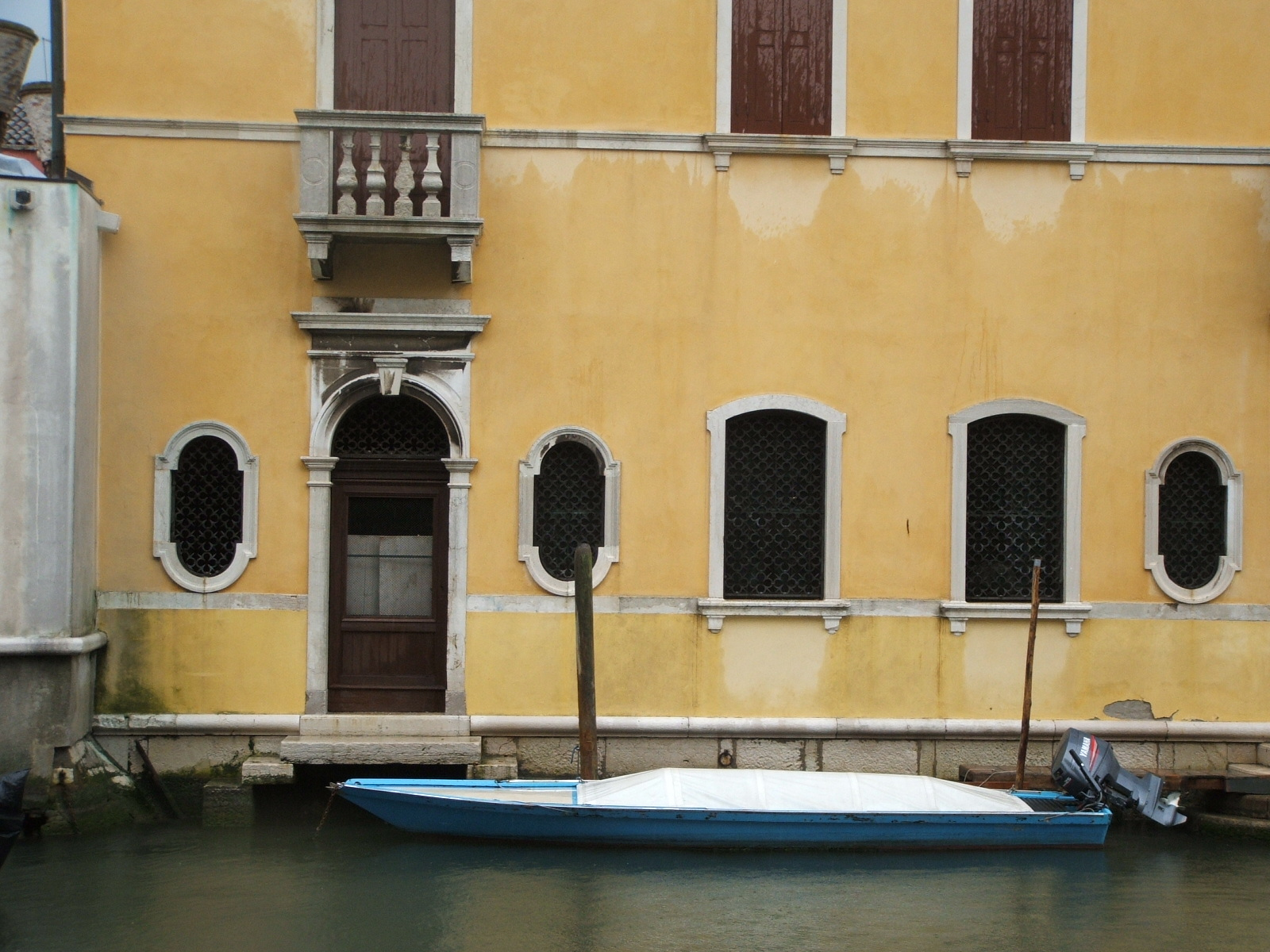 Chioggia, laguna veneta